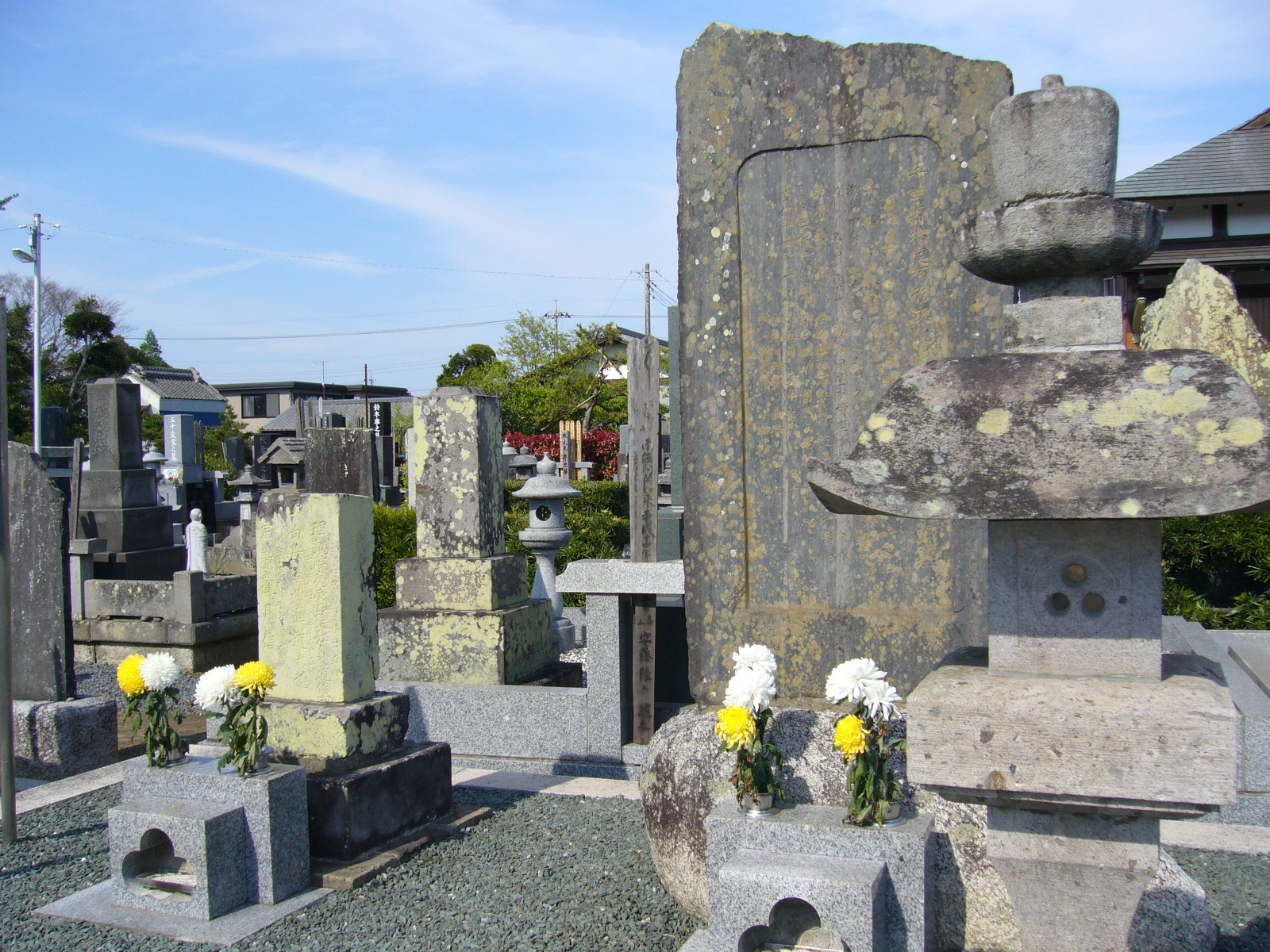 matumoto koshiroⅠ grave,katori-city,japan